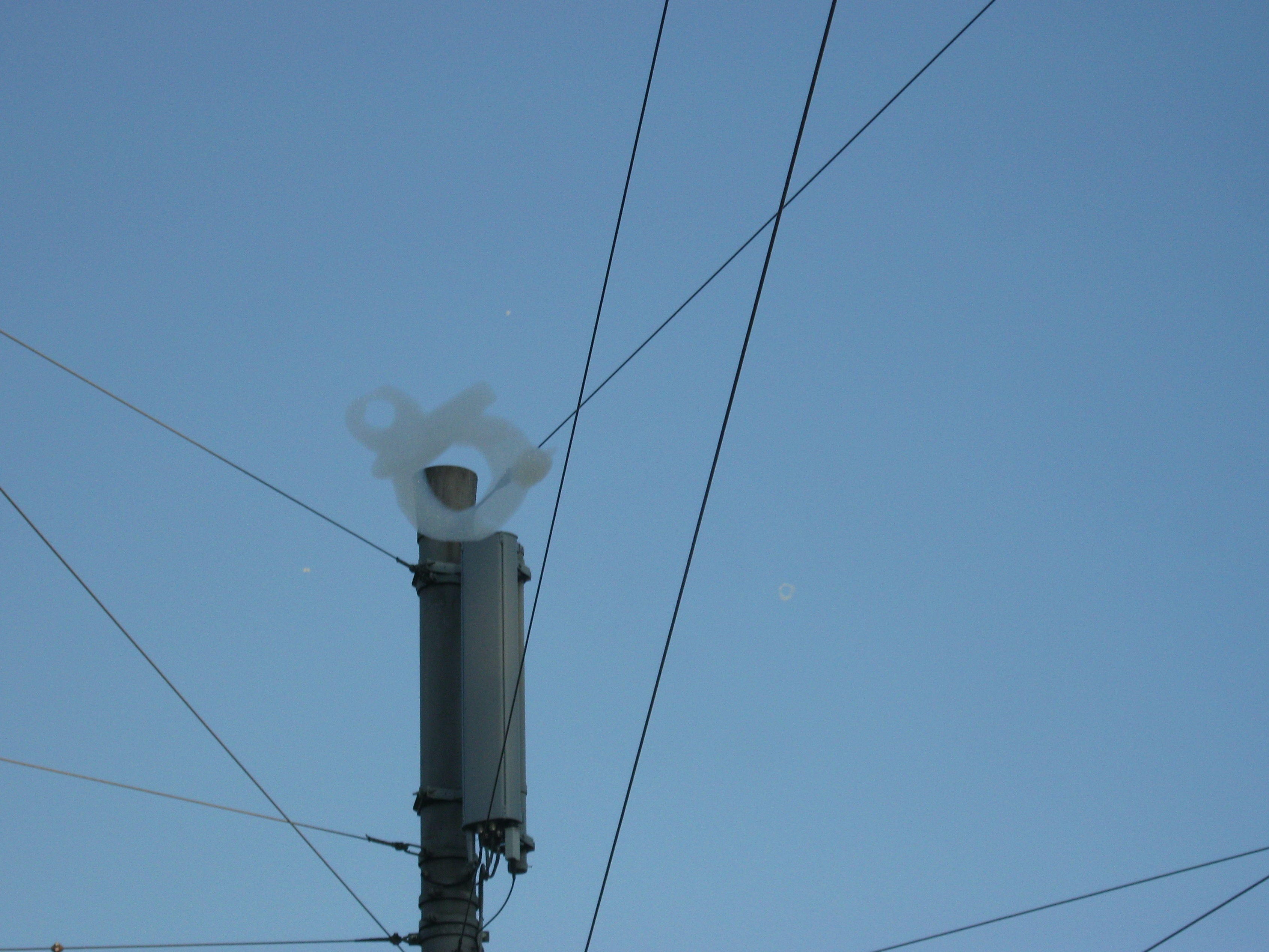 Flogo auf der Streetparade 2013, Mobilfunkantenne